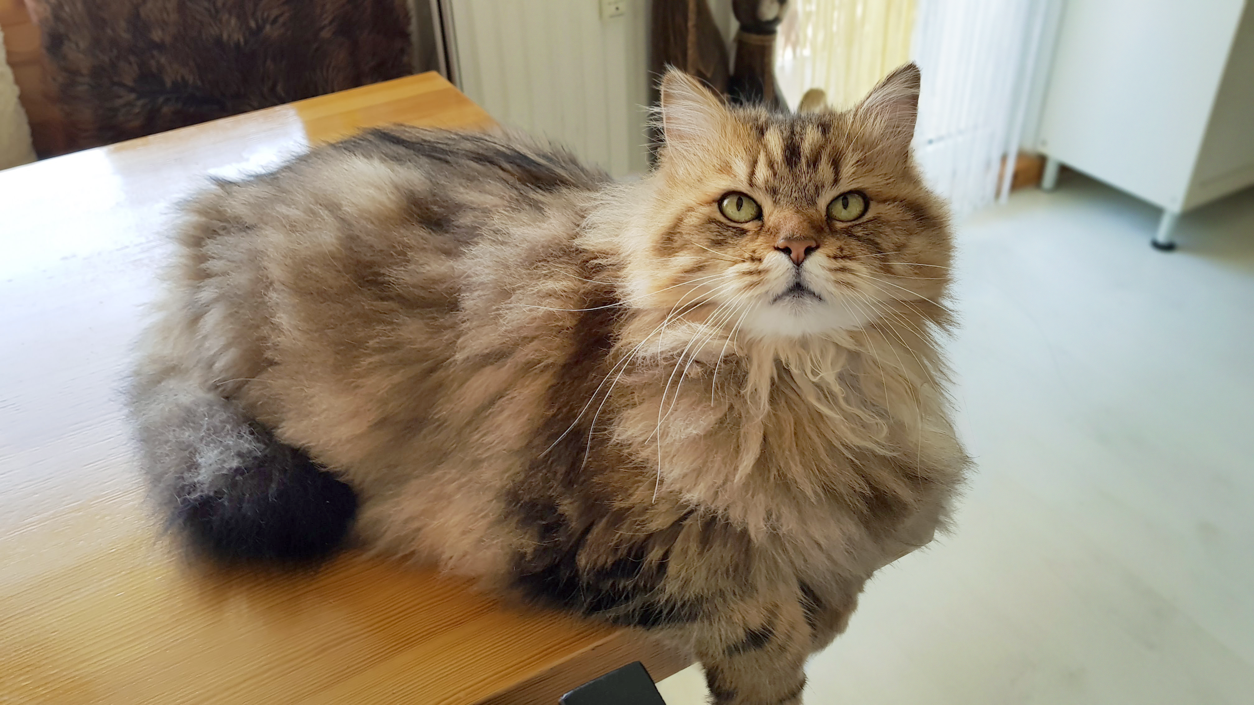 Zdjęcie kotki rasy syberyjskiej w wieku 5-ciu lat.